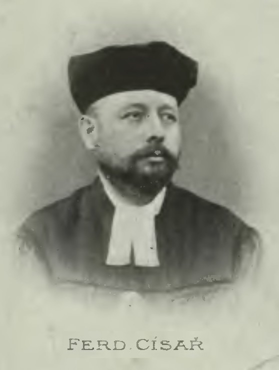 Portrét – Ferdinand Císař (1850 - 1932), Český evangelický duchovní.